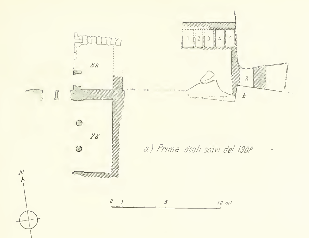 zone nord-est du Palais de Phaistos avant les fouilles de 1908 où fut découvert le disque de phaistos